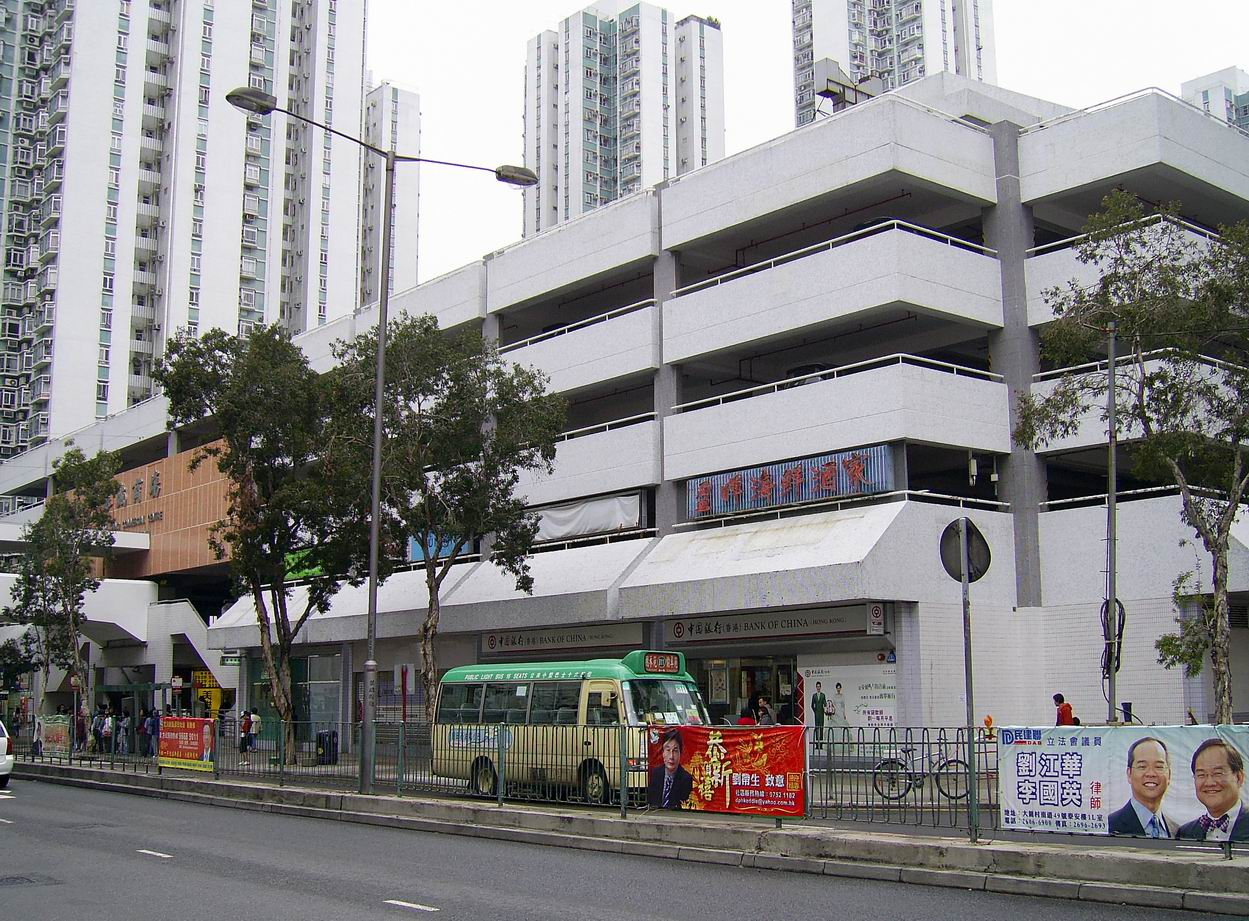 沙田第一城銀城商場